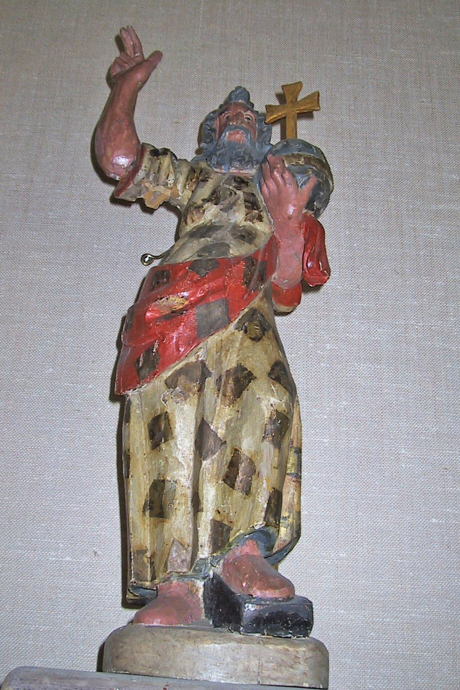 Kristusfigur i Brandval kirke, Norway